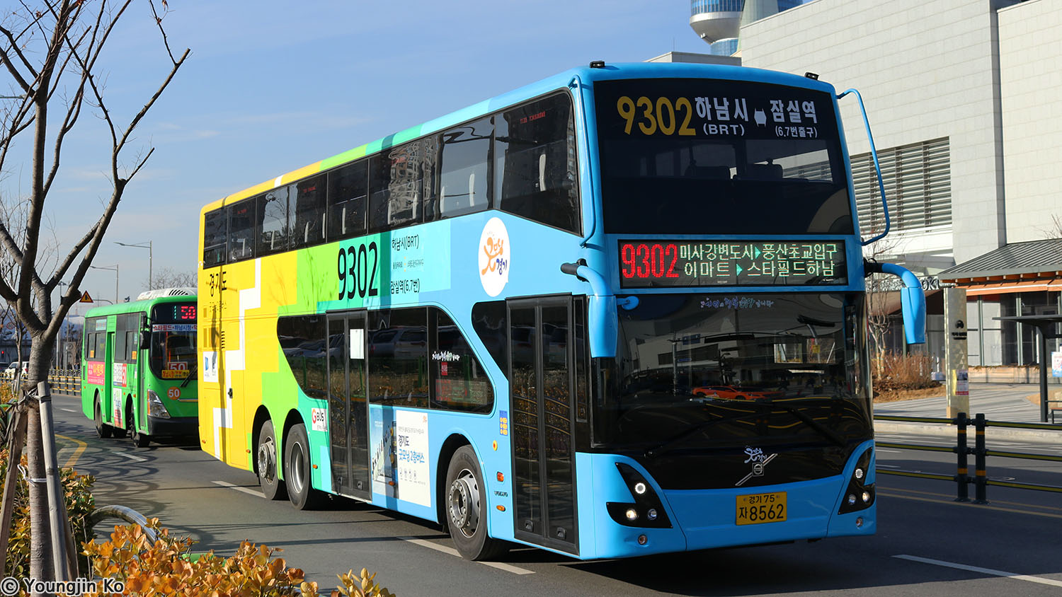 Volvo B8RLE 대만 Daji 사 바디 2층버스 F/L 버스가 9302번 노선을 운행하고 있다.